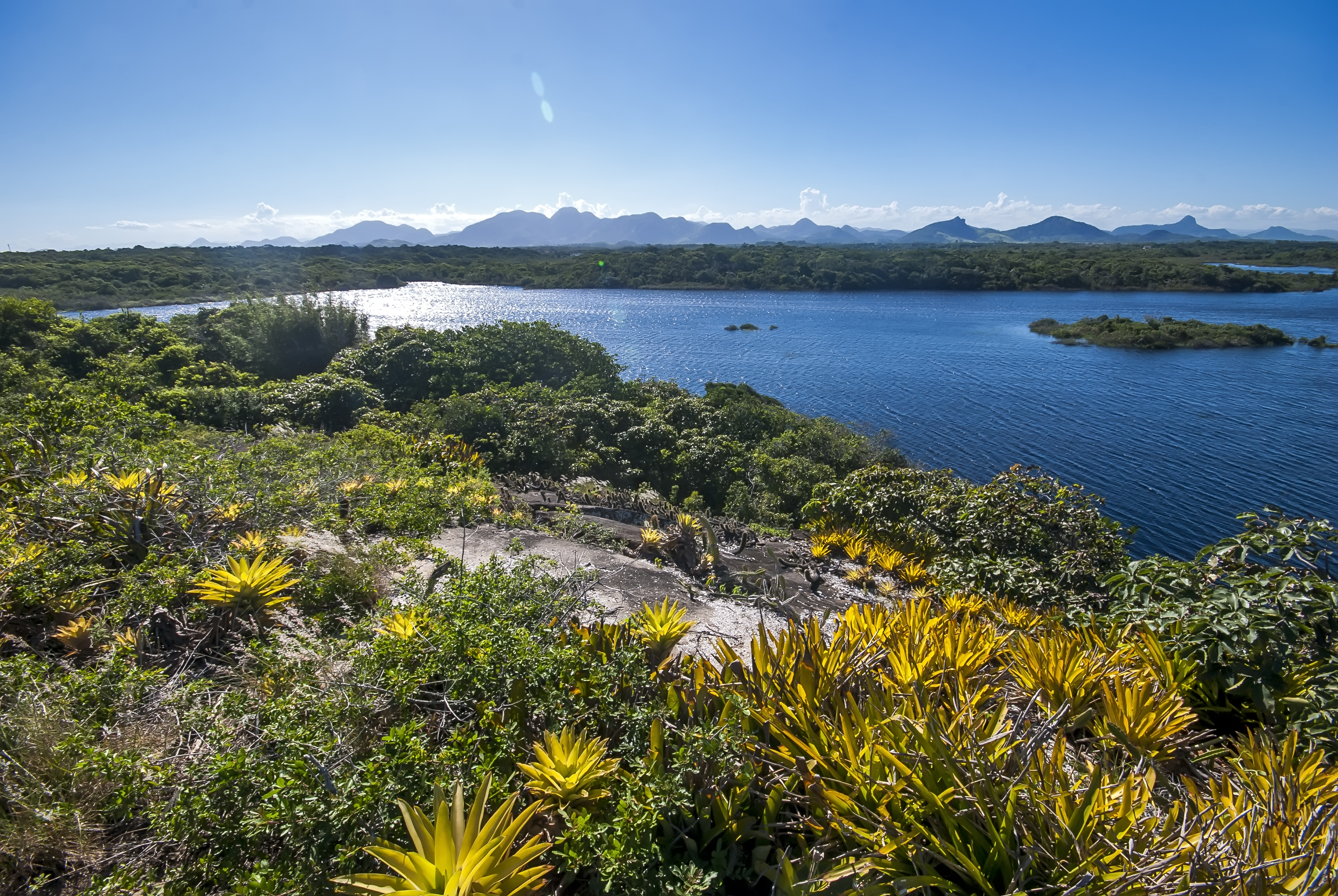 Lagoa de Caraís, também conhecida como Lagoa Coca-cola, devido a suas águas naturais avermelhadas, com bromélias em suas margens, no Parque Estadual Paulo Cesar Vinha (PEPCV), em Guarapari/ES.